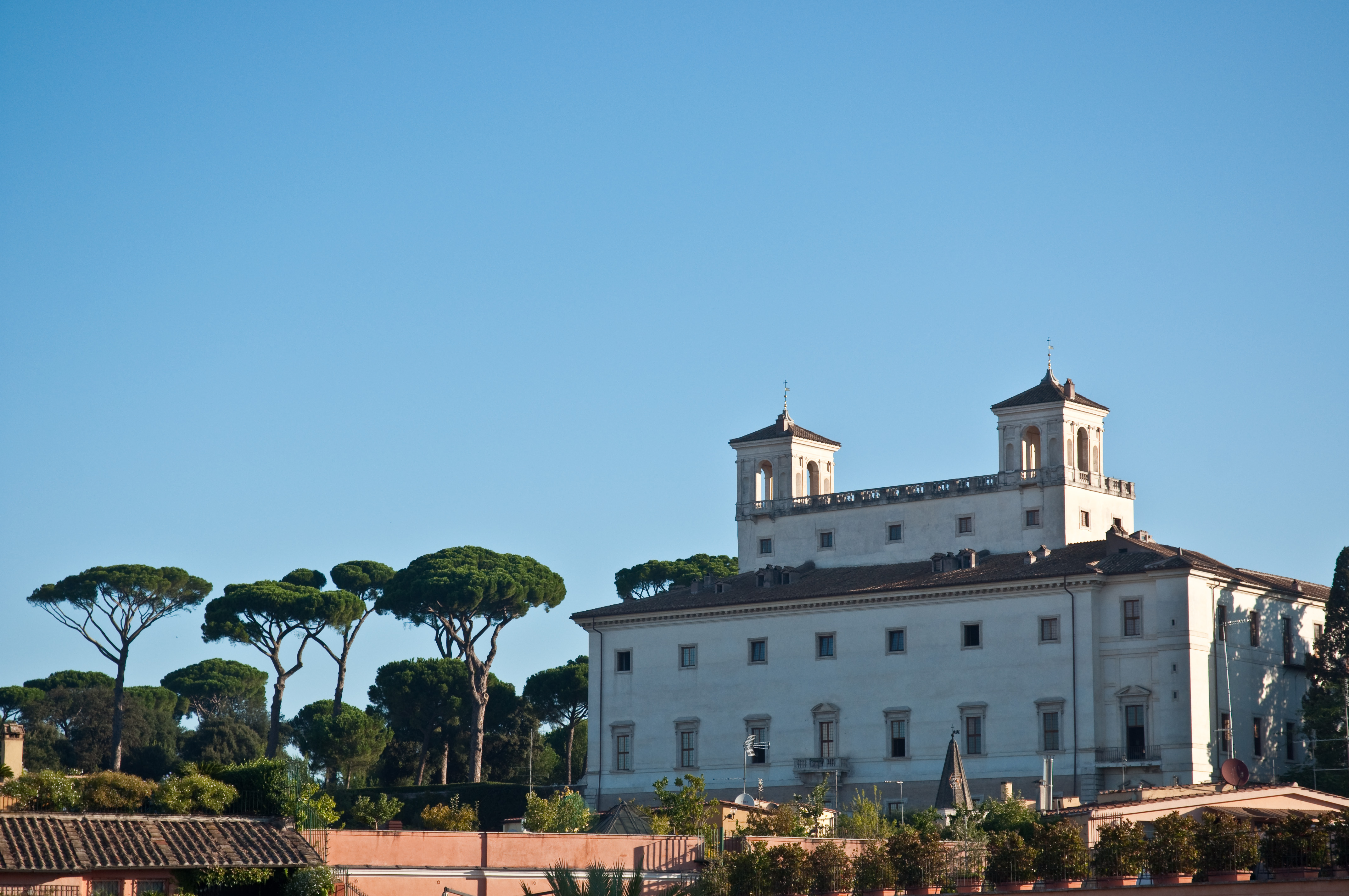 Villa Medici, Rome, Sept. 2011